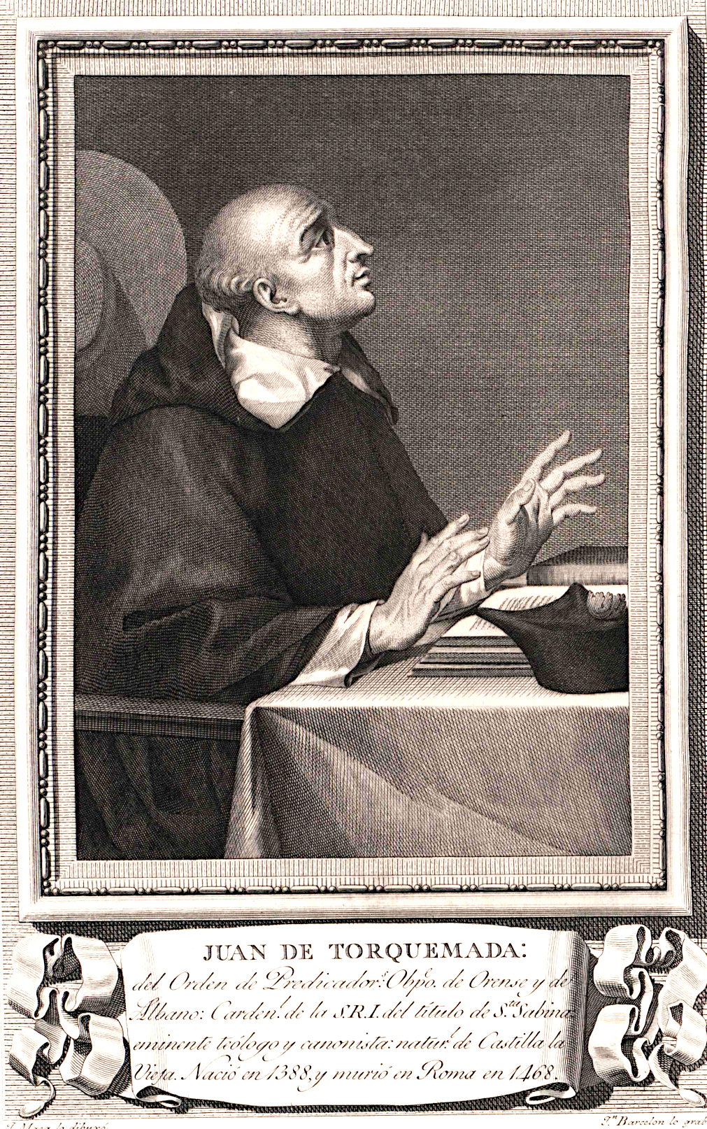 Retrato de Juan de Torquemada.